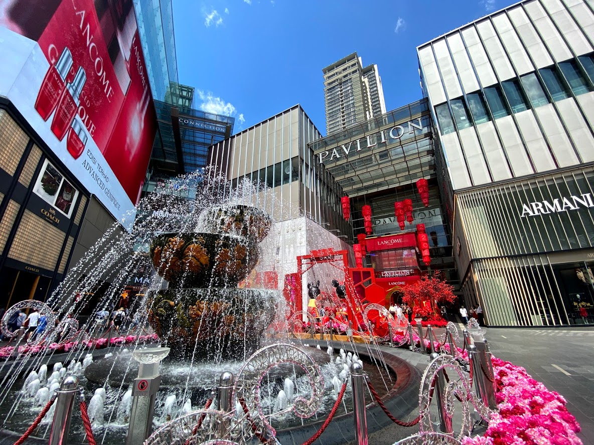 柏威年廣場標誌性地標